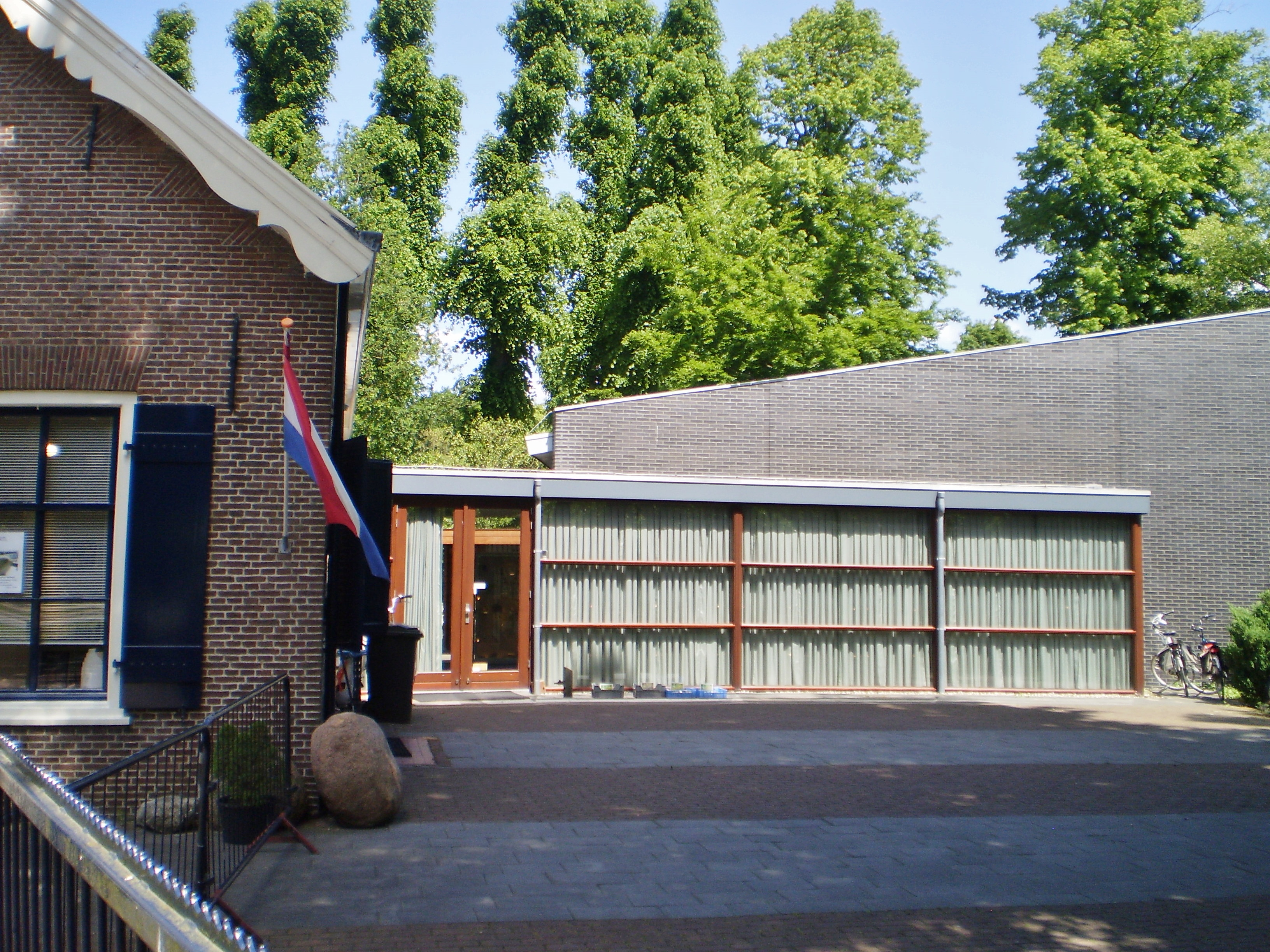 Geologisch Museum in Laren